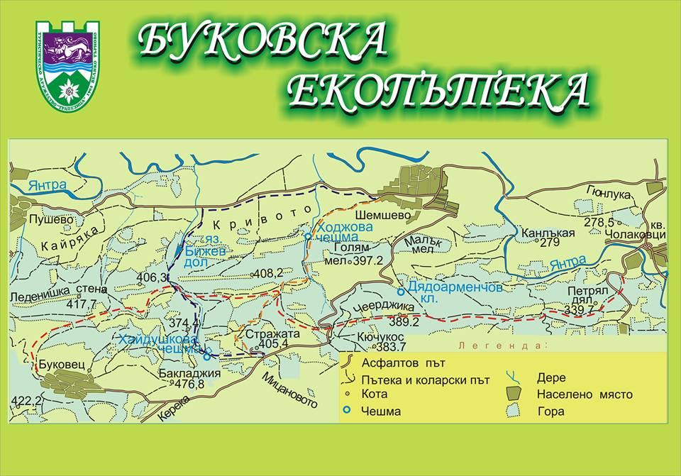 БУКОВСКА ЕКОПЪТЕКА